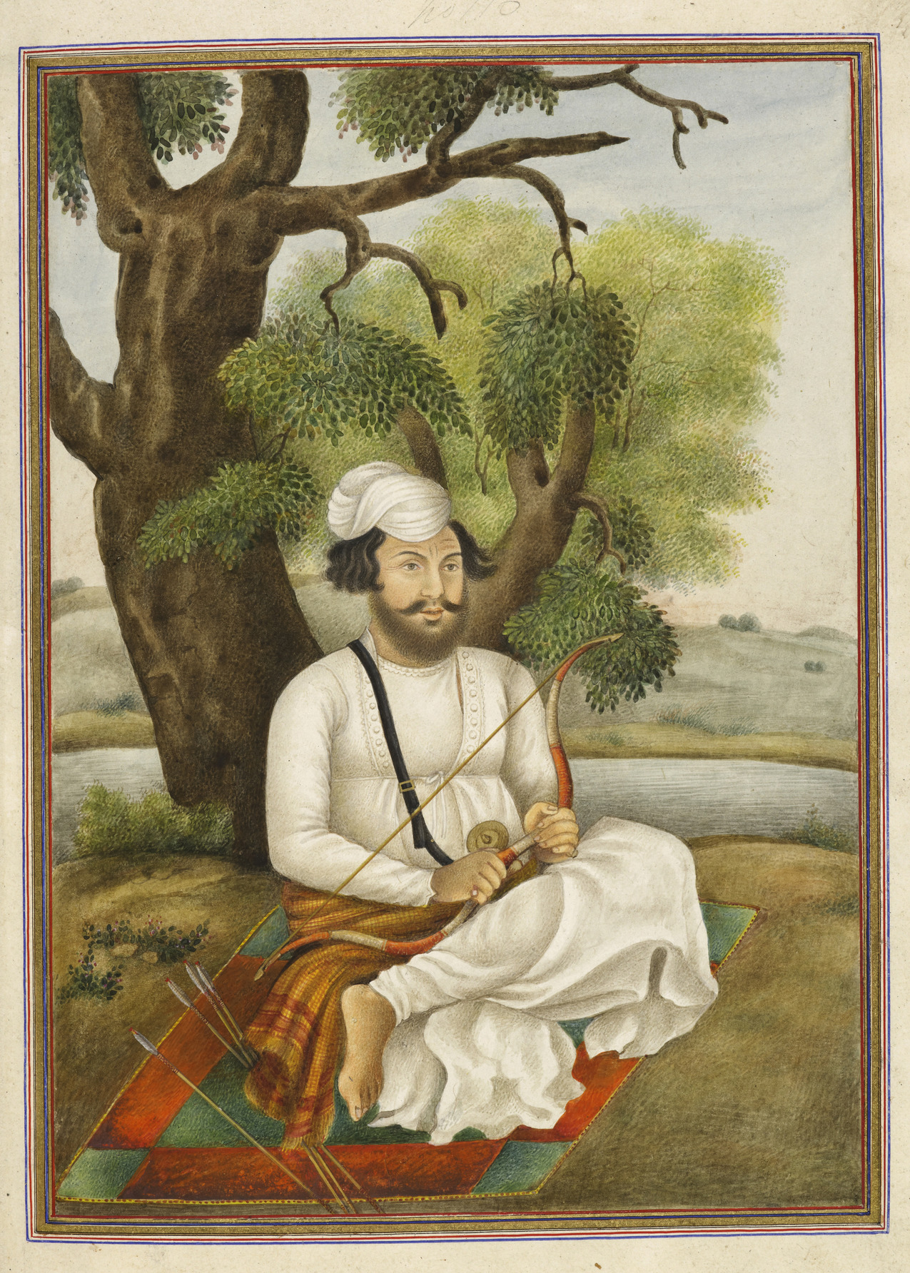 Qusuri or ‘Kusuri, an Afghan of Kasur.